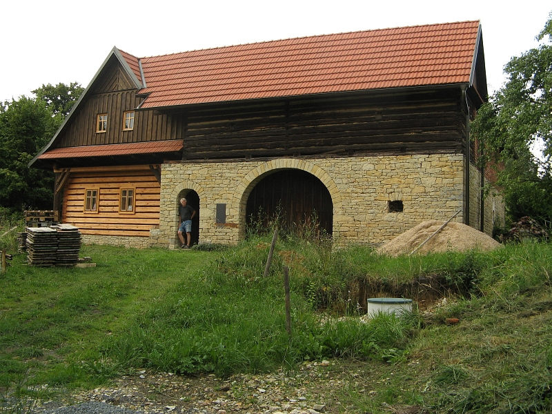 Usedlost čp. 53, Jehnědí 53, Jehnědí.